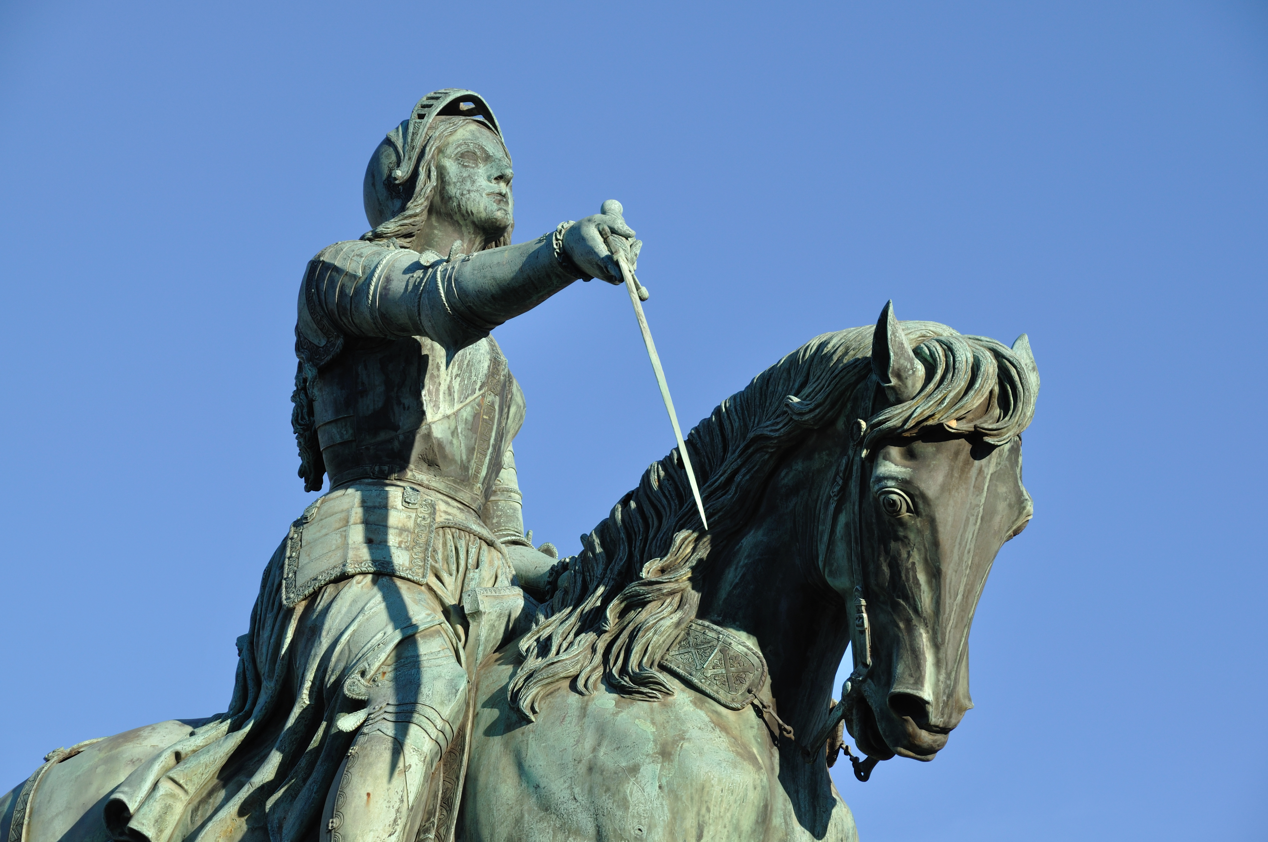 Détail de la statue de Jeanne d'Arc place du Martroi à Orléans par Denis Foyatier.